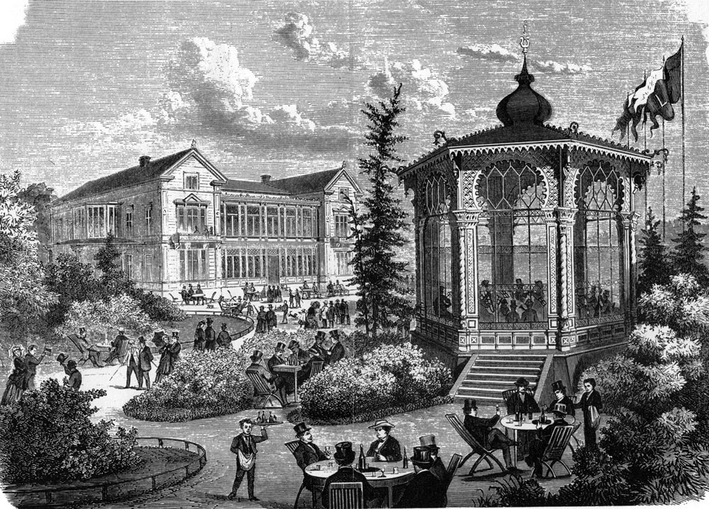 Lorensbergsparken i Göteborg